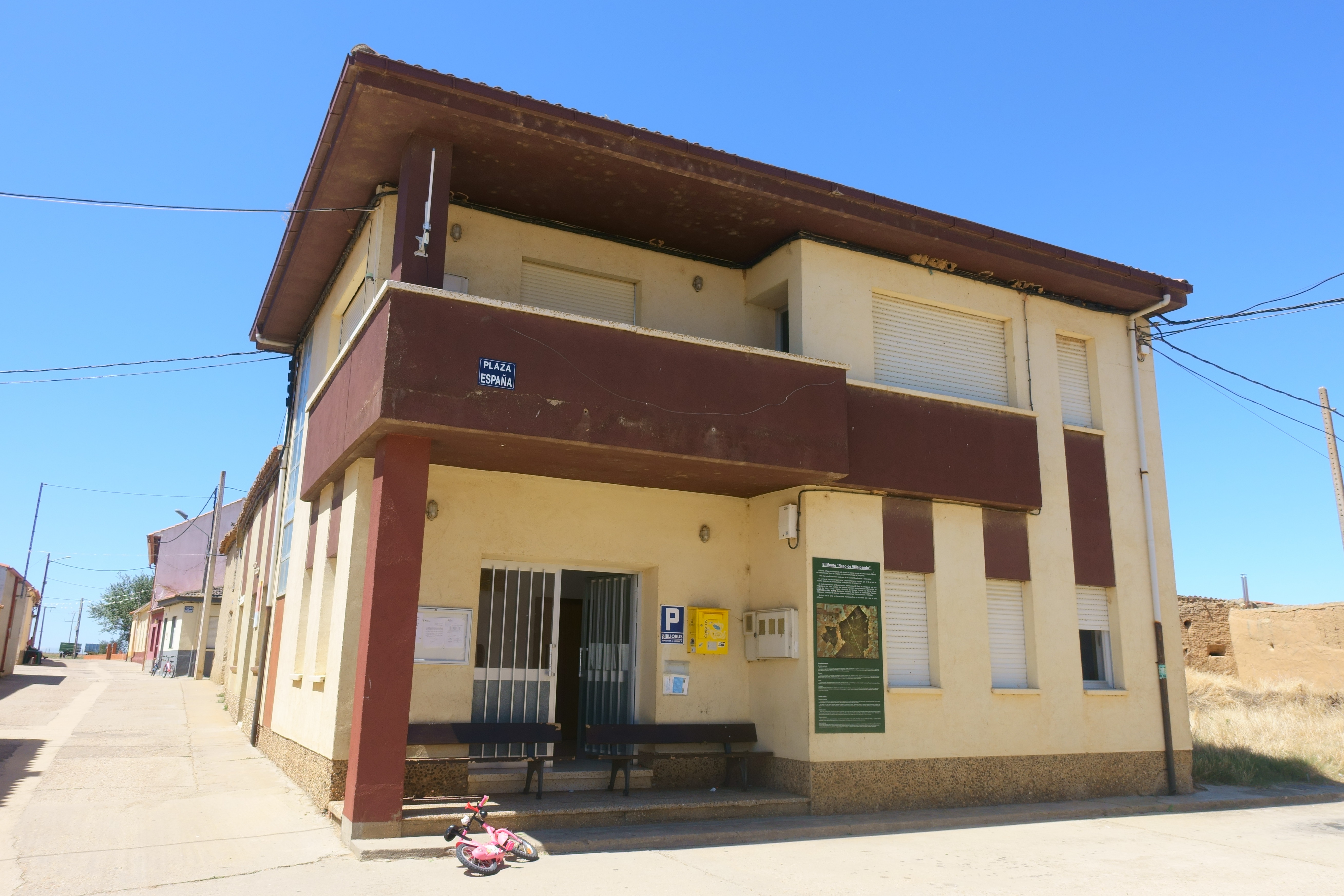 Casa consistorial de Quintanilla del Monte (Zamora, España).